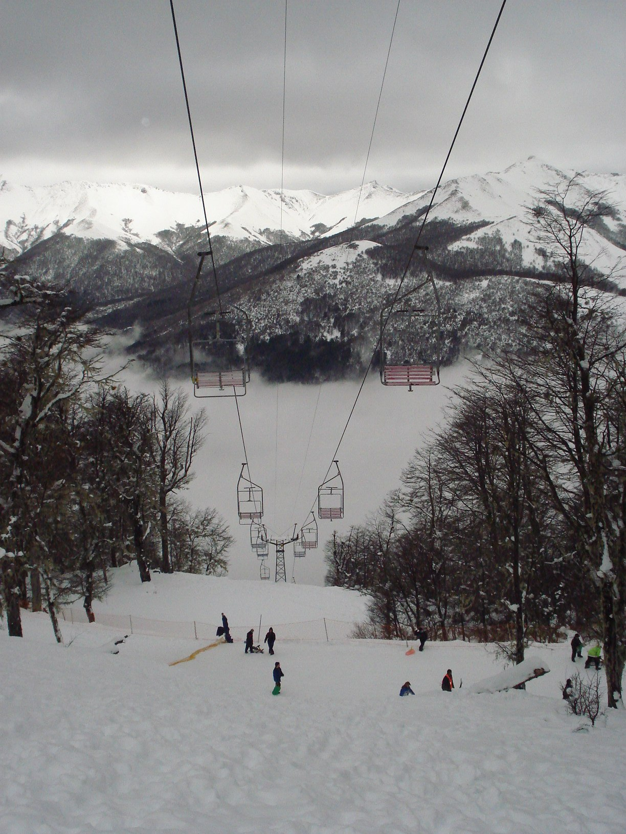 Cerro Bayo - Villa la Angostura - Neuquen -Invierno